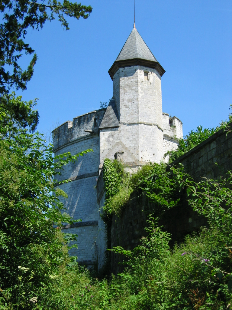 Château de Tancarville, Tancarville, Seine-Maritime, France